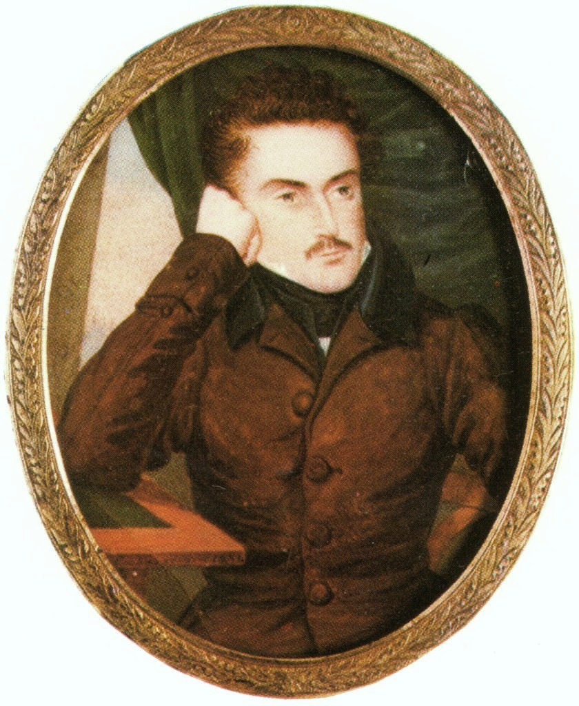 Михаил Петрович Бутурли́н (1786—1860)